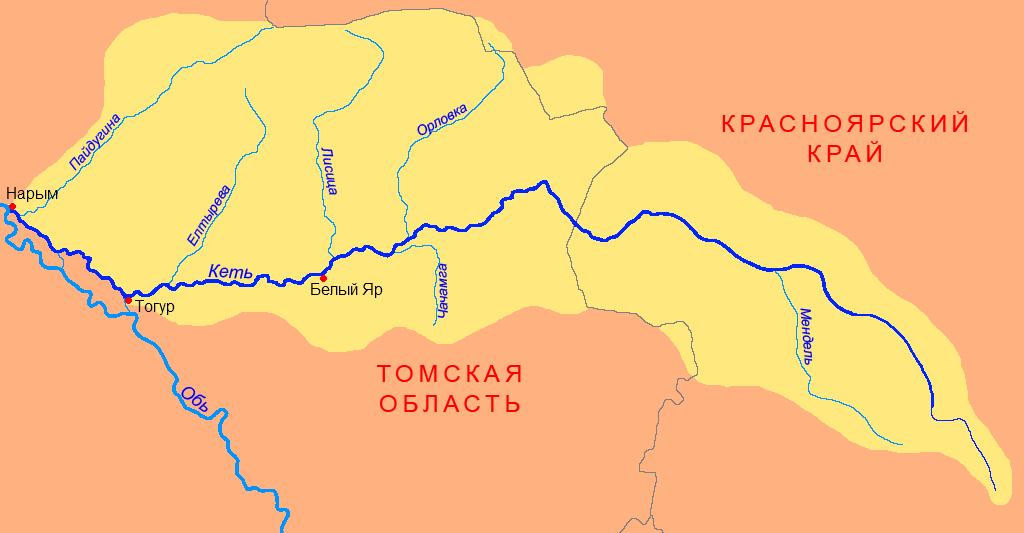 Схема бассейна реки Кеть